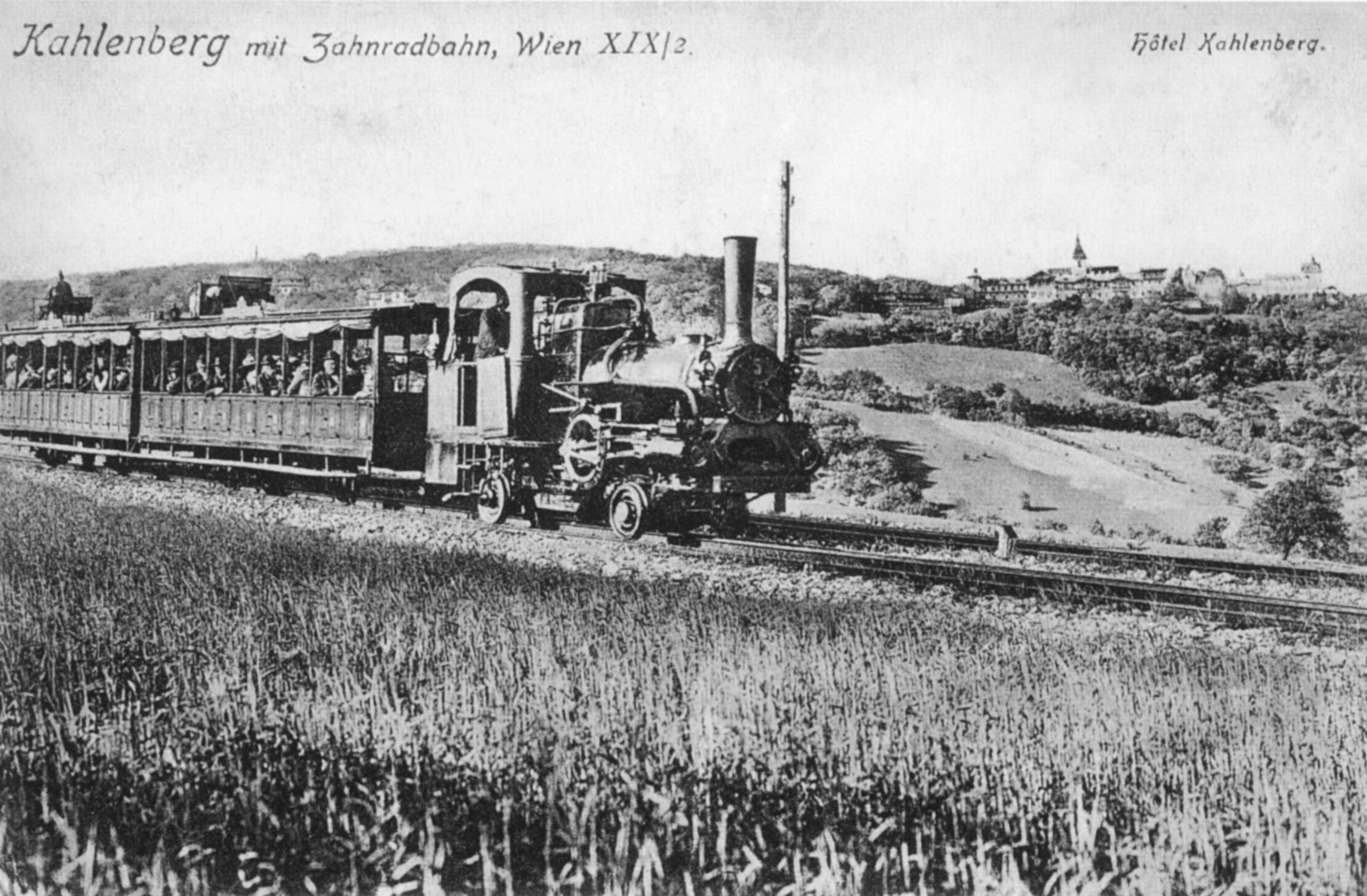 en: Kahlenbergbahn cog railway in Vienna, historic picture postcard de: Kahlenbergbahn in Wien, historische Postkarte